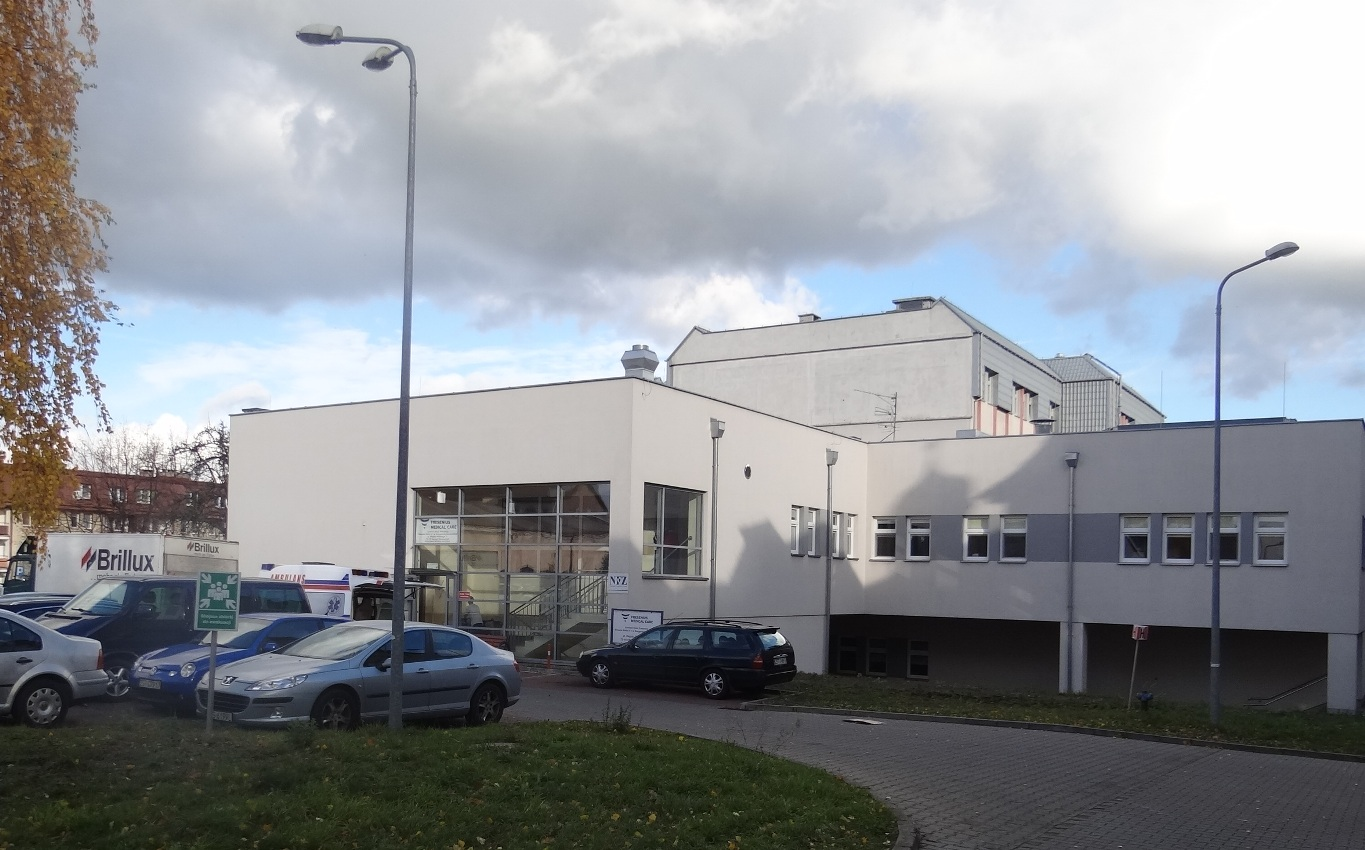 Szpital, 2015r. Stacja dializ